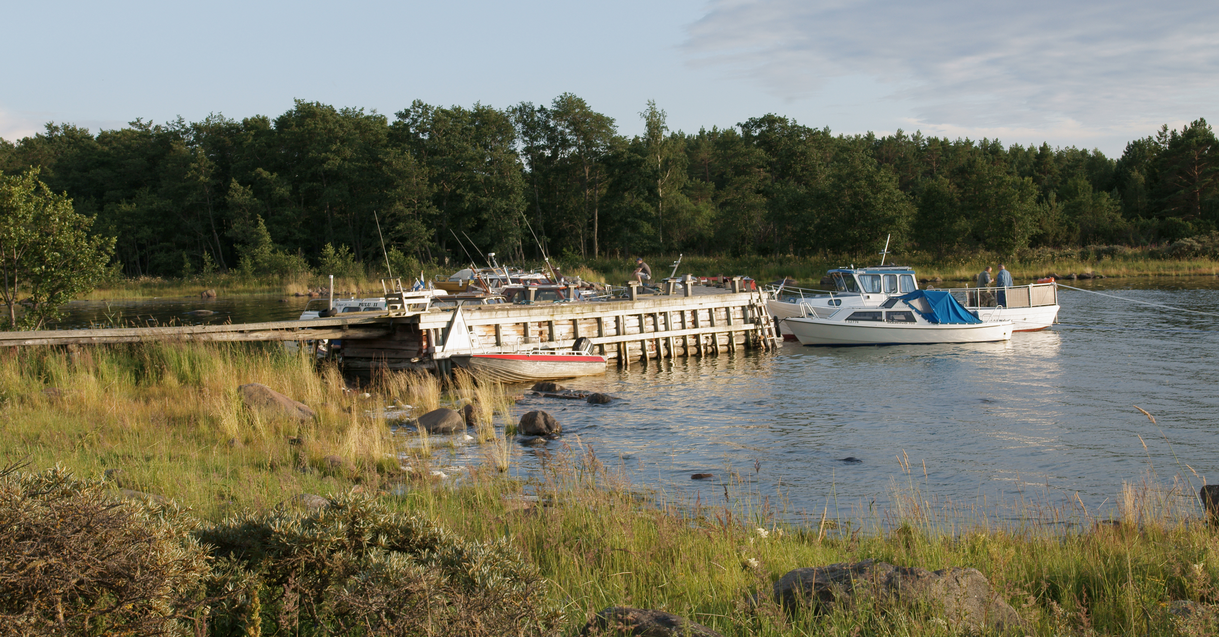 Säpin satama.